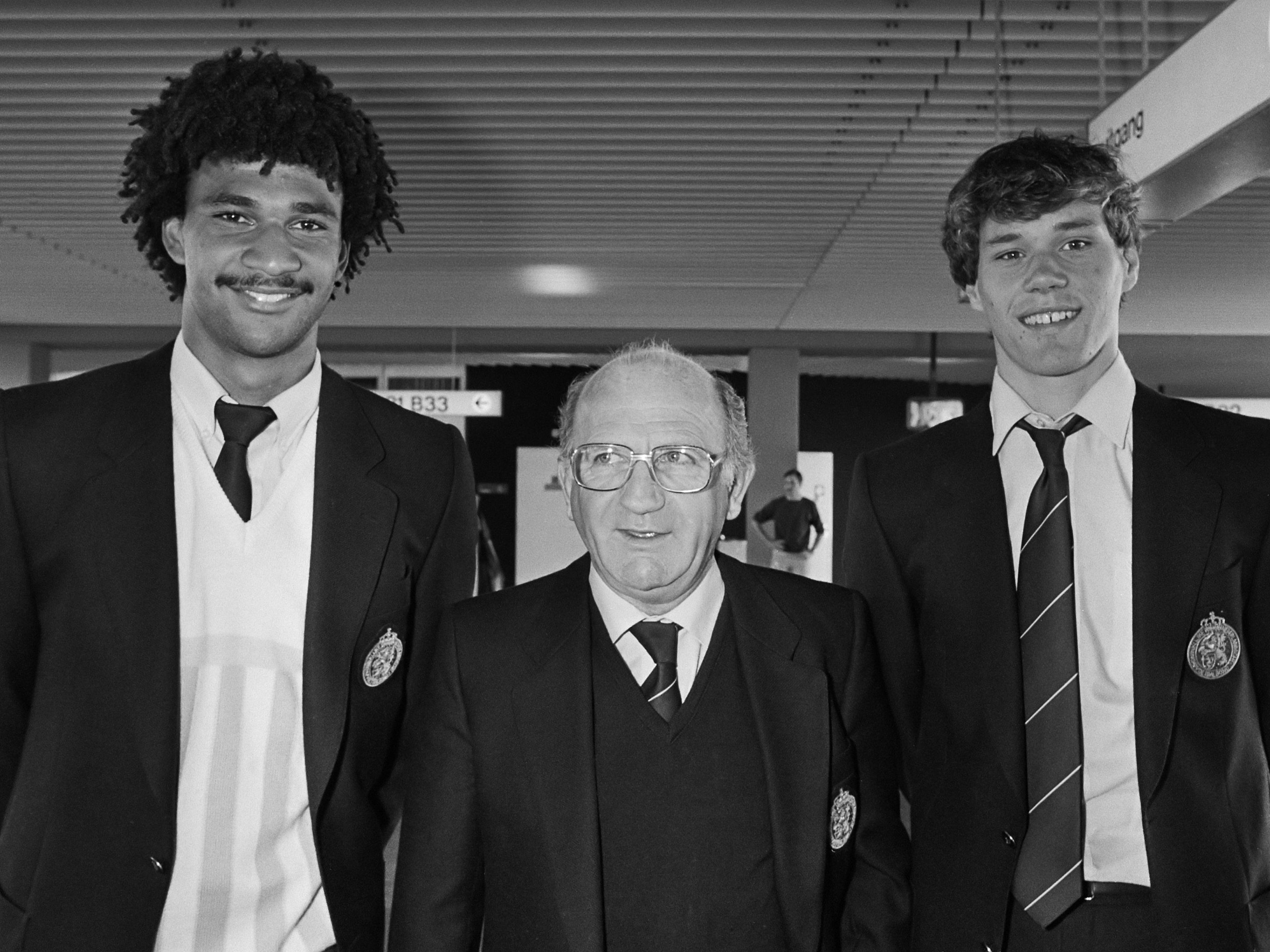 Aankomst van het Nederlands elftal op Schiphol na een gewonnen interland tegen Ierland (2-3); bondscoach Rijvers met de doelpuntenmakers Gullit (l) en Van Basten (r) 13 oktober 1983